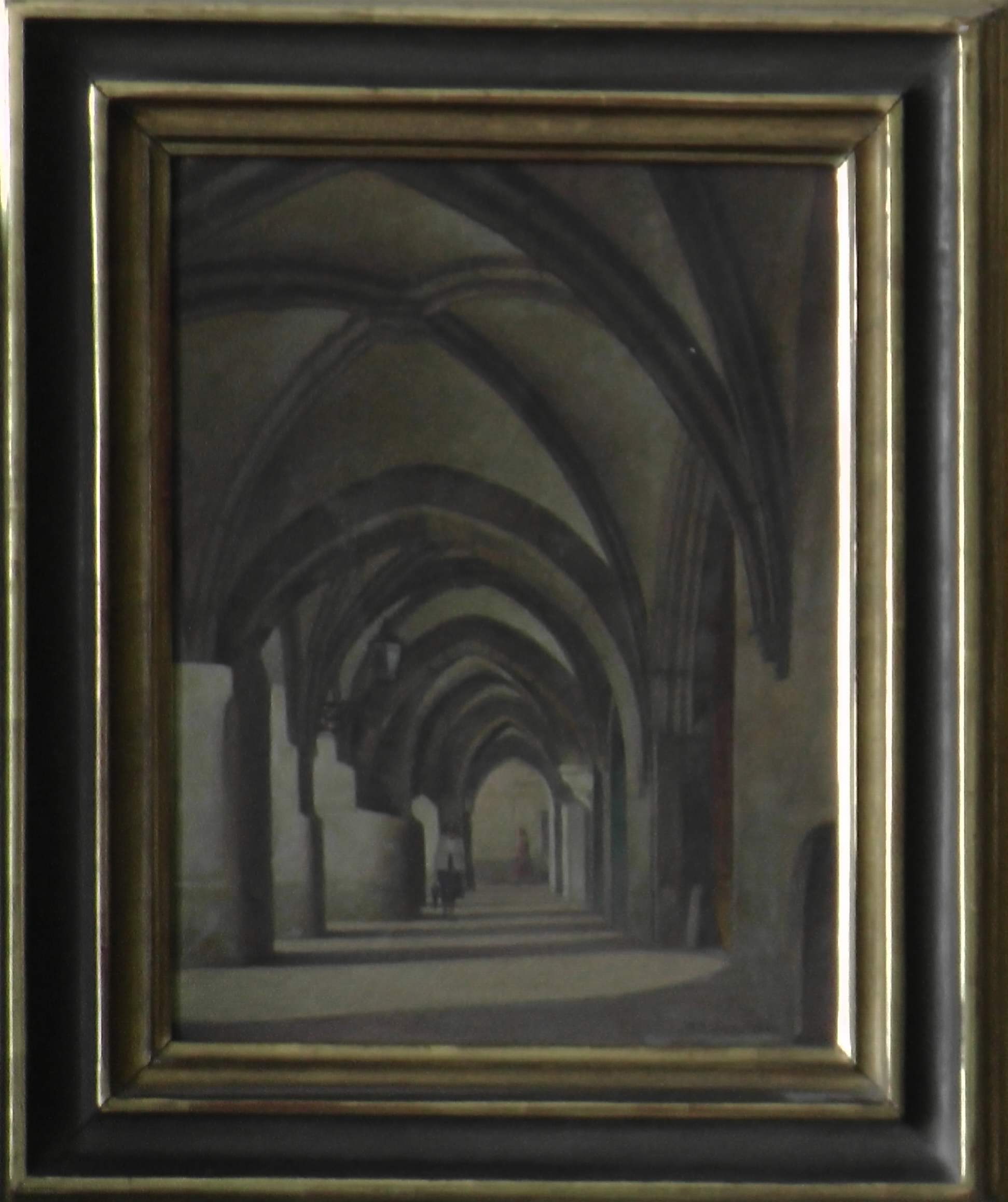 podloubi_tyn